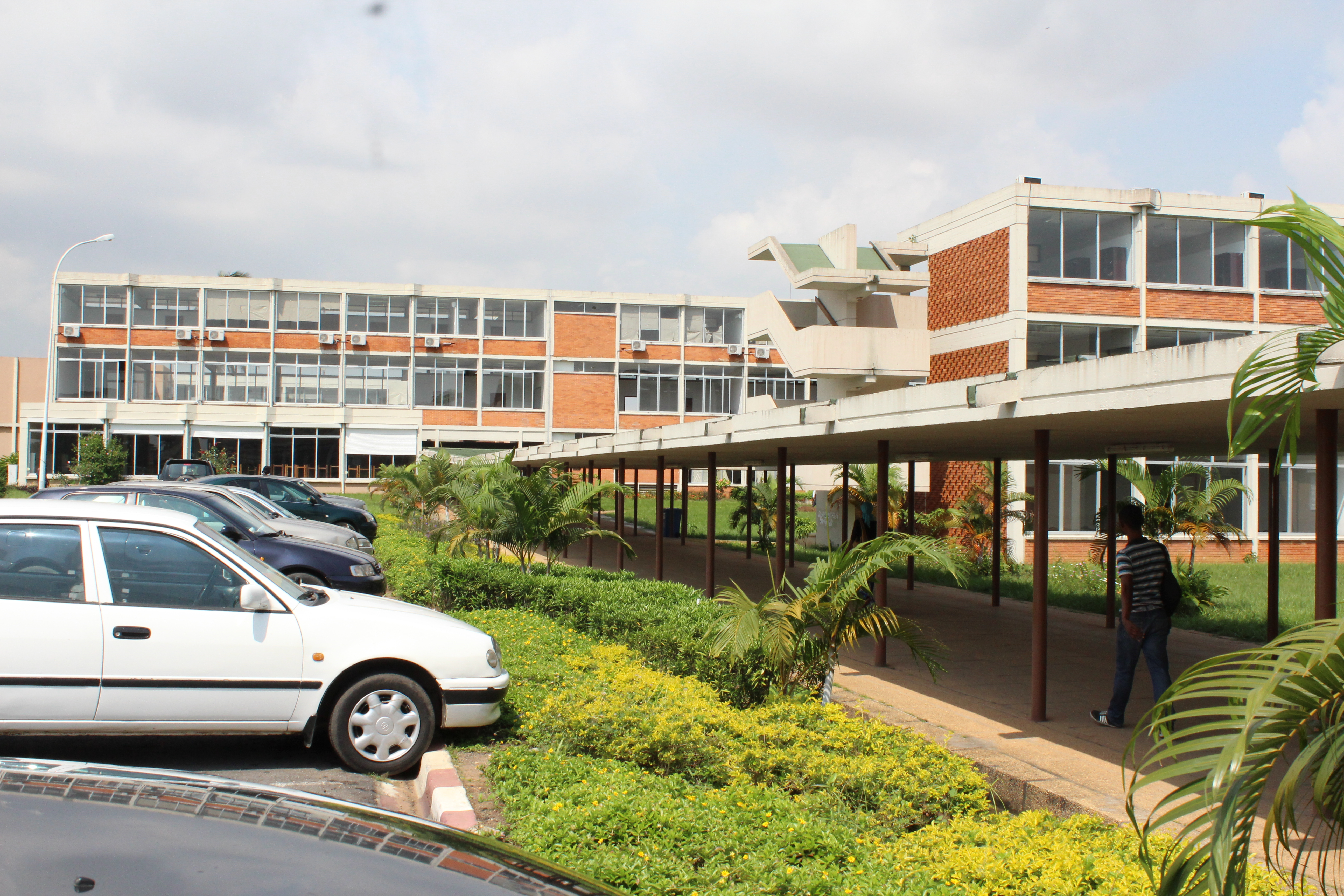 Vue partielle de l'Université Félix Houphouët-Boigny à Abidjan Cocody